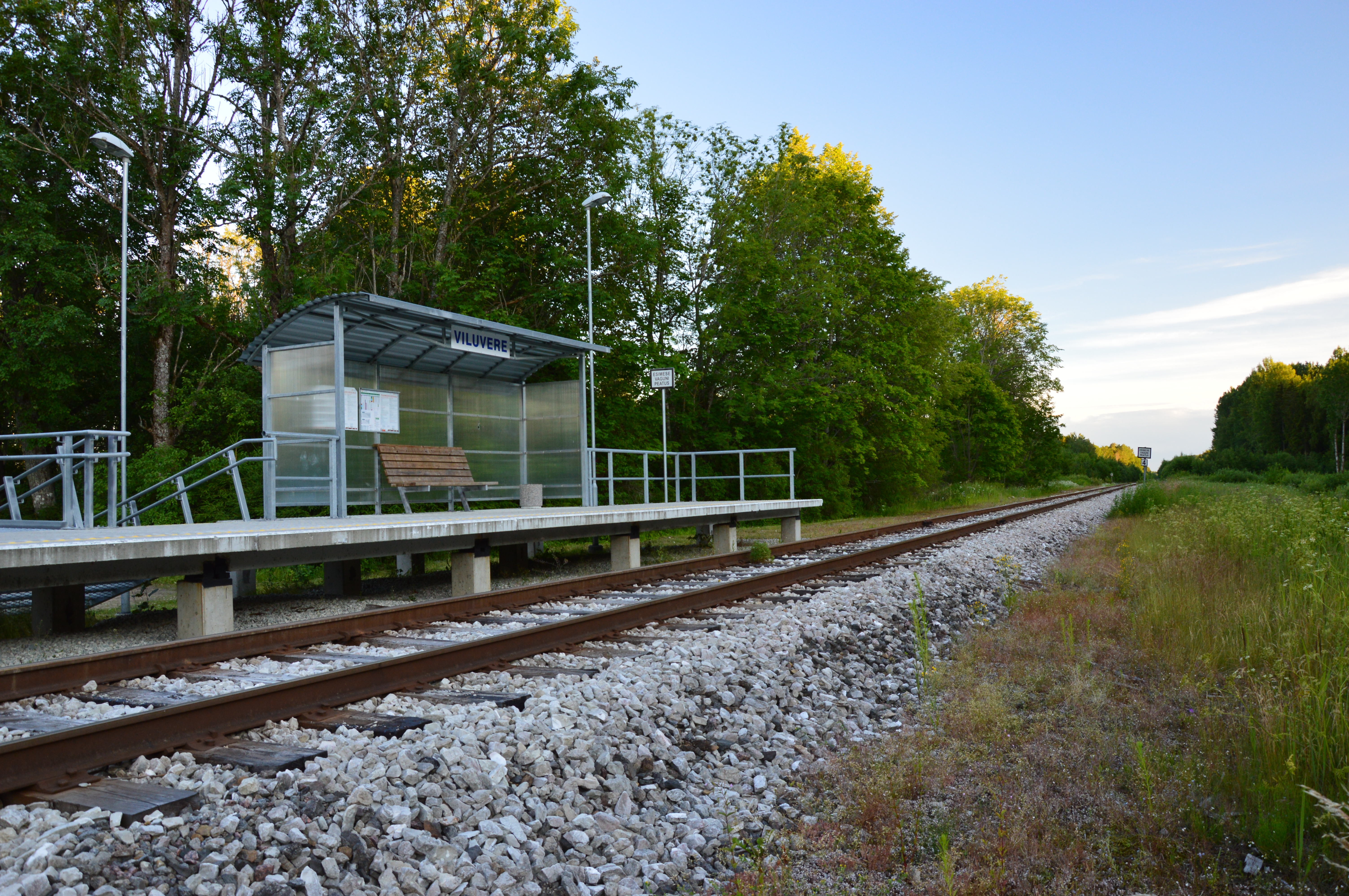 Viluvere raudteepeatus.